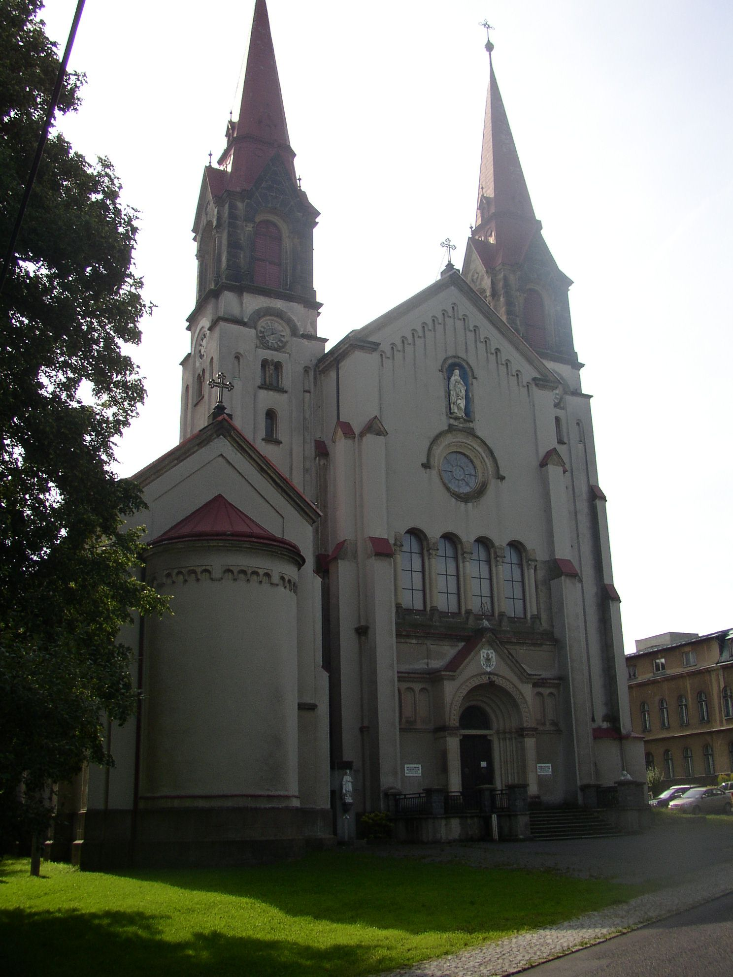 Bazilika Panny Marie Pomocnice křesťanů (Filipov)